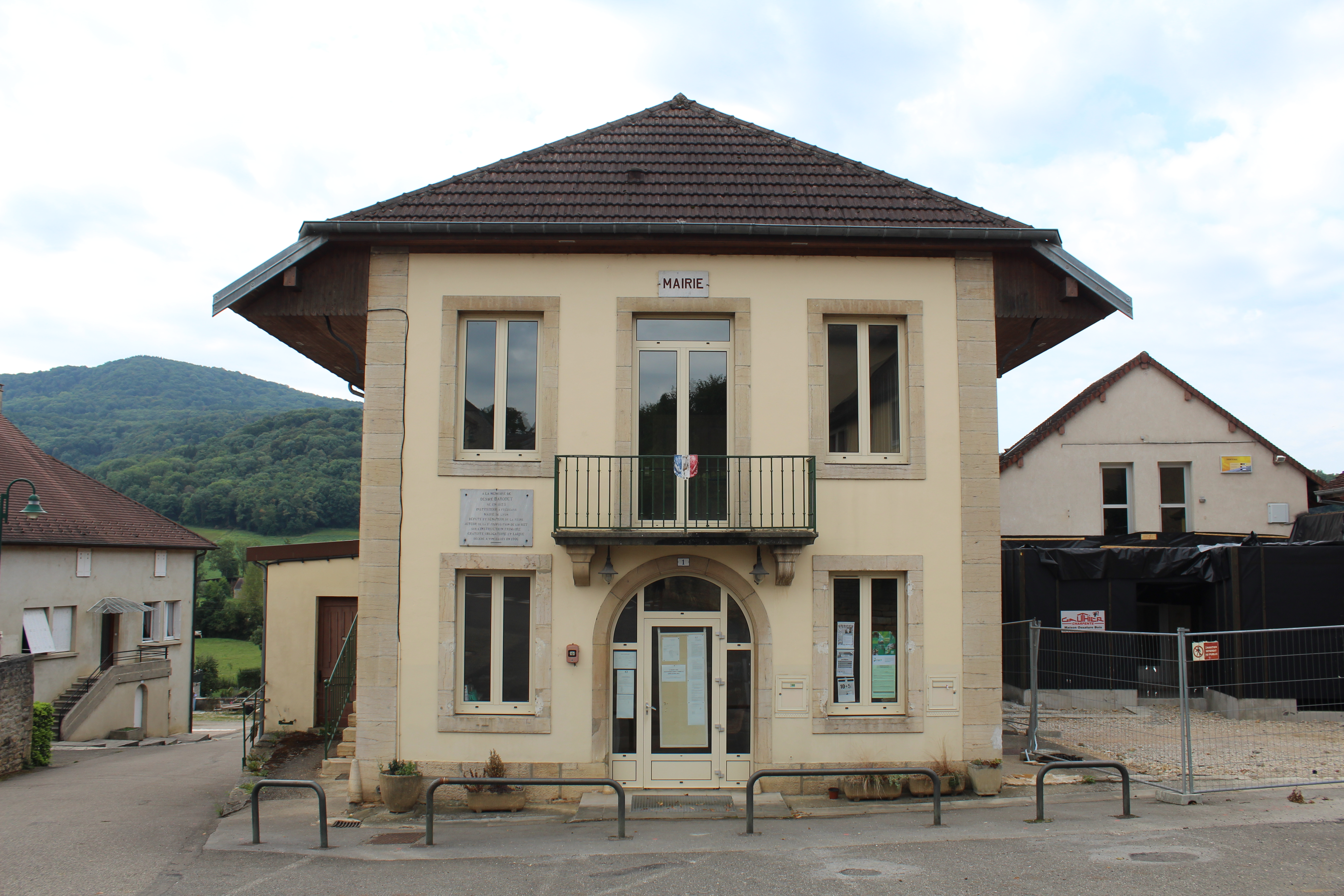 Mairie de Vincelles, Val-Sonnette.